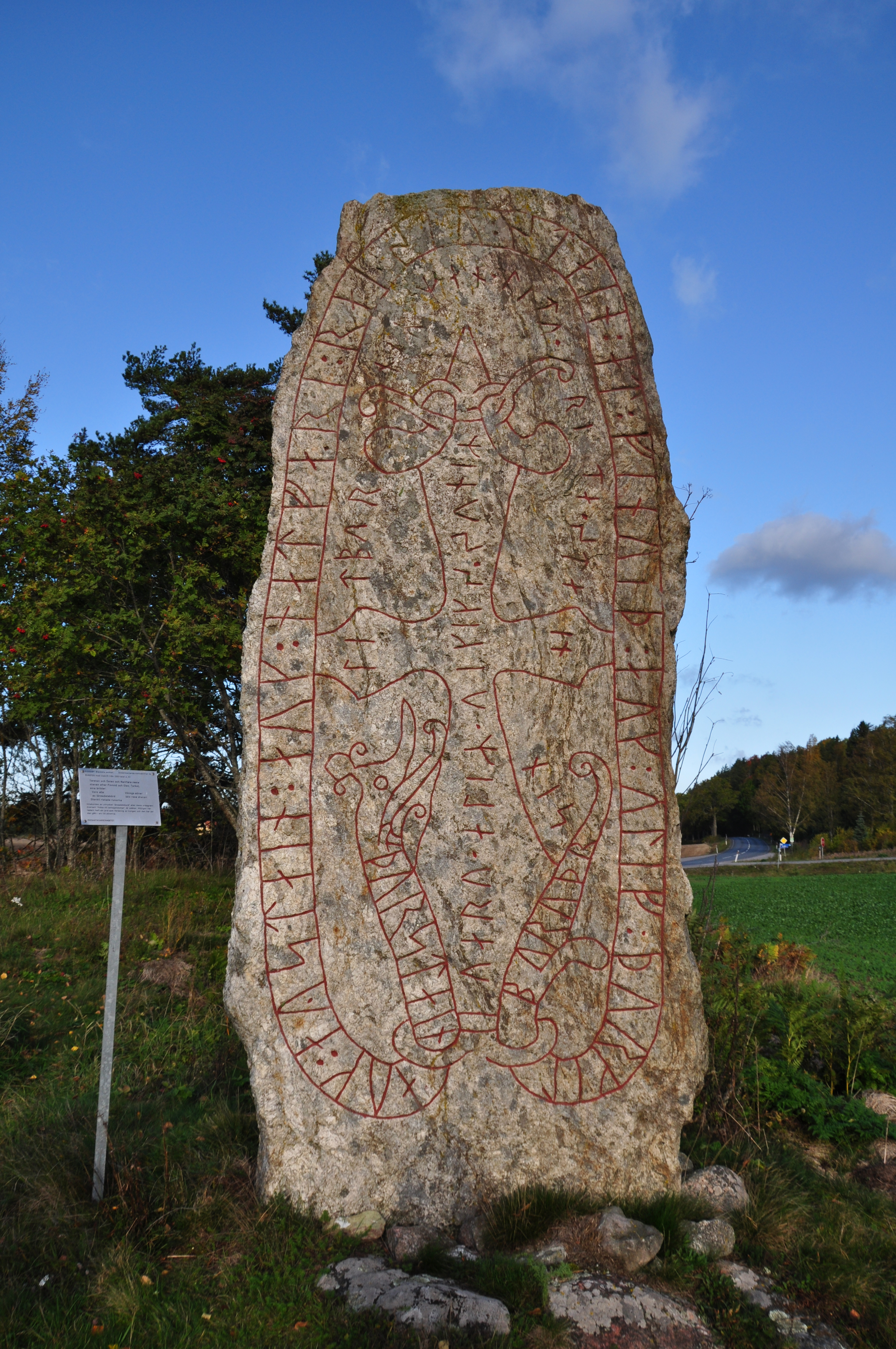 Runsten Sö 54 Bjudby strax söder om Vadsbro i Södermanland. Stenen är signerad "Stenkil".